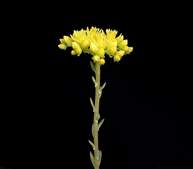 Sedum rupestre